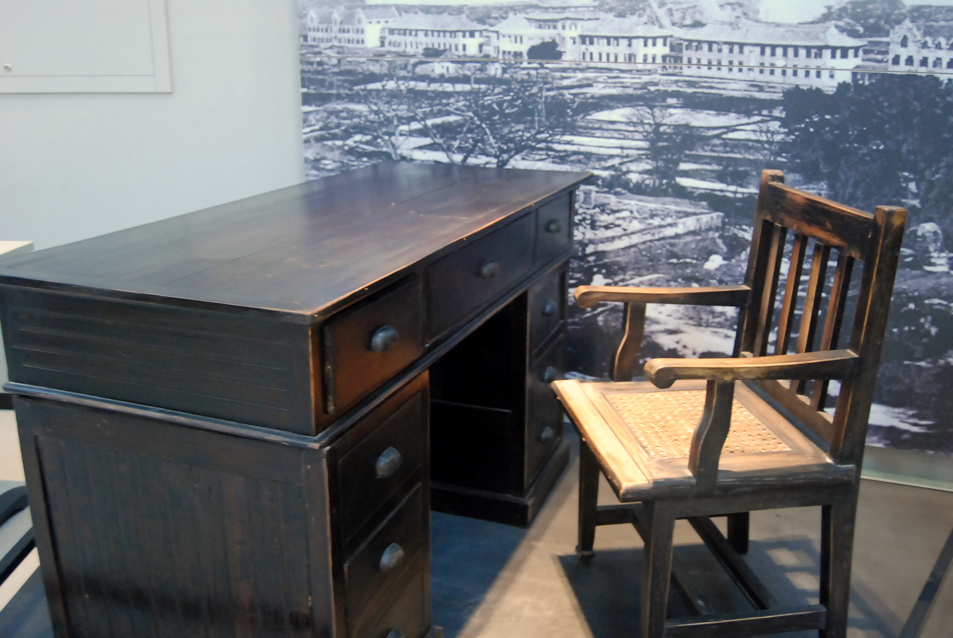 中国1920年代的书桌，于鲁迅博物馆